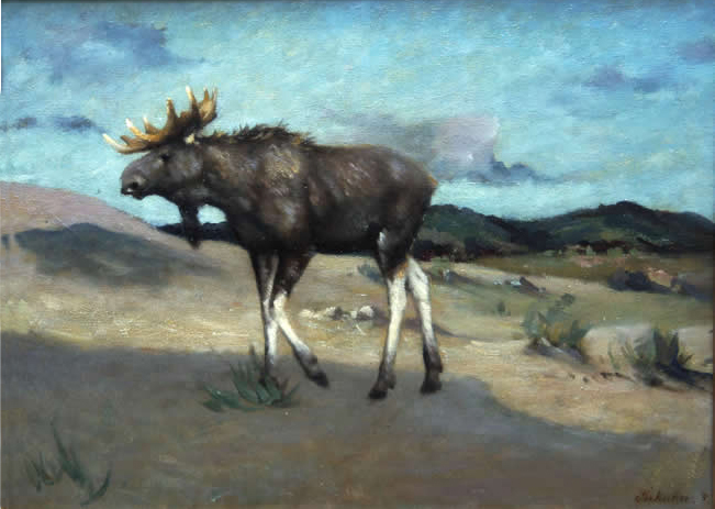 Elch